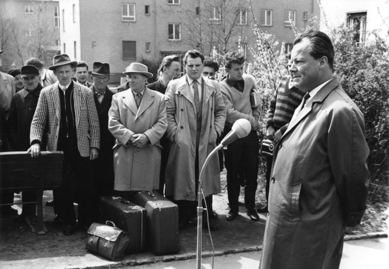 29.4.1960 West-Berlin Bürgermeister Willy Brandt im Notaufnahmelager Marienfelde